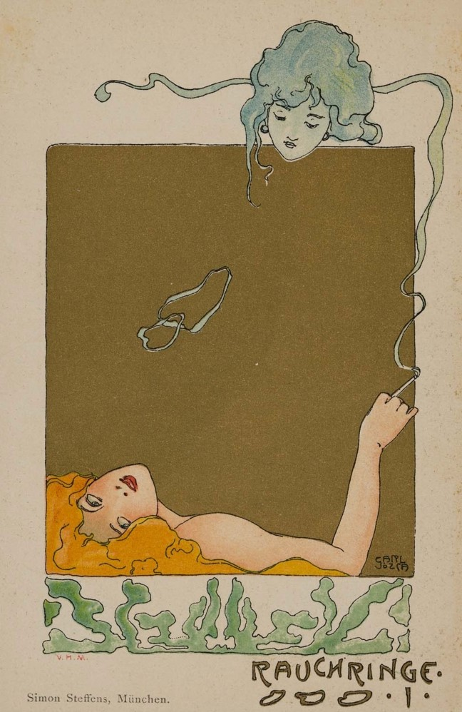 Carl Józsa - Rauchringe I, from the series Smoke Rings